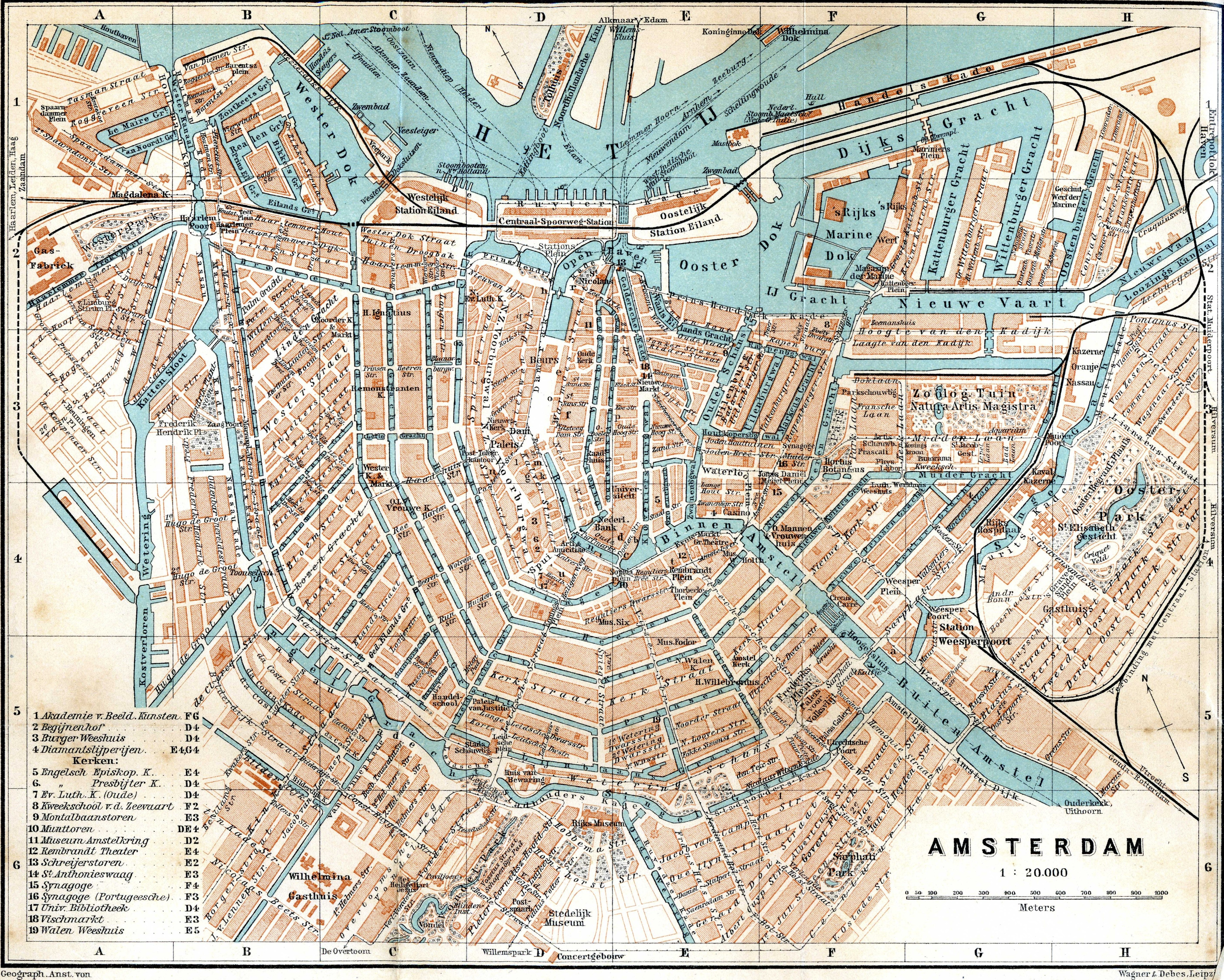 Inlegkaart van Amsterdam uit de Baedeker reisgids van 1905